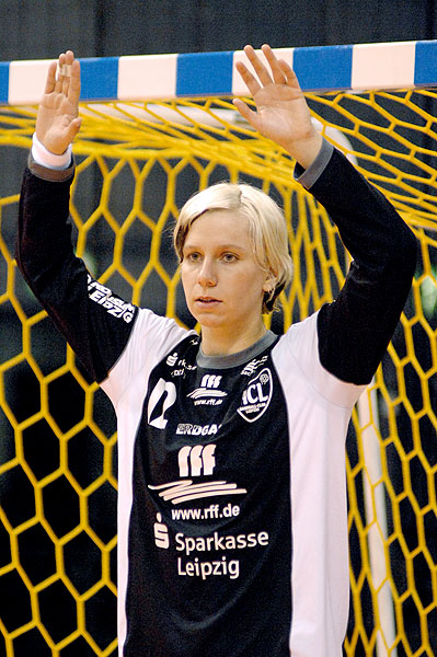 Portrait Foto Katja Schülke